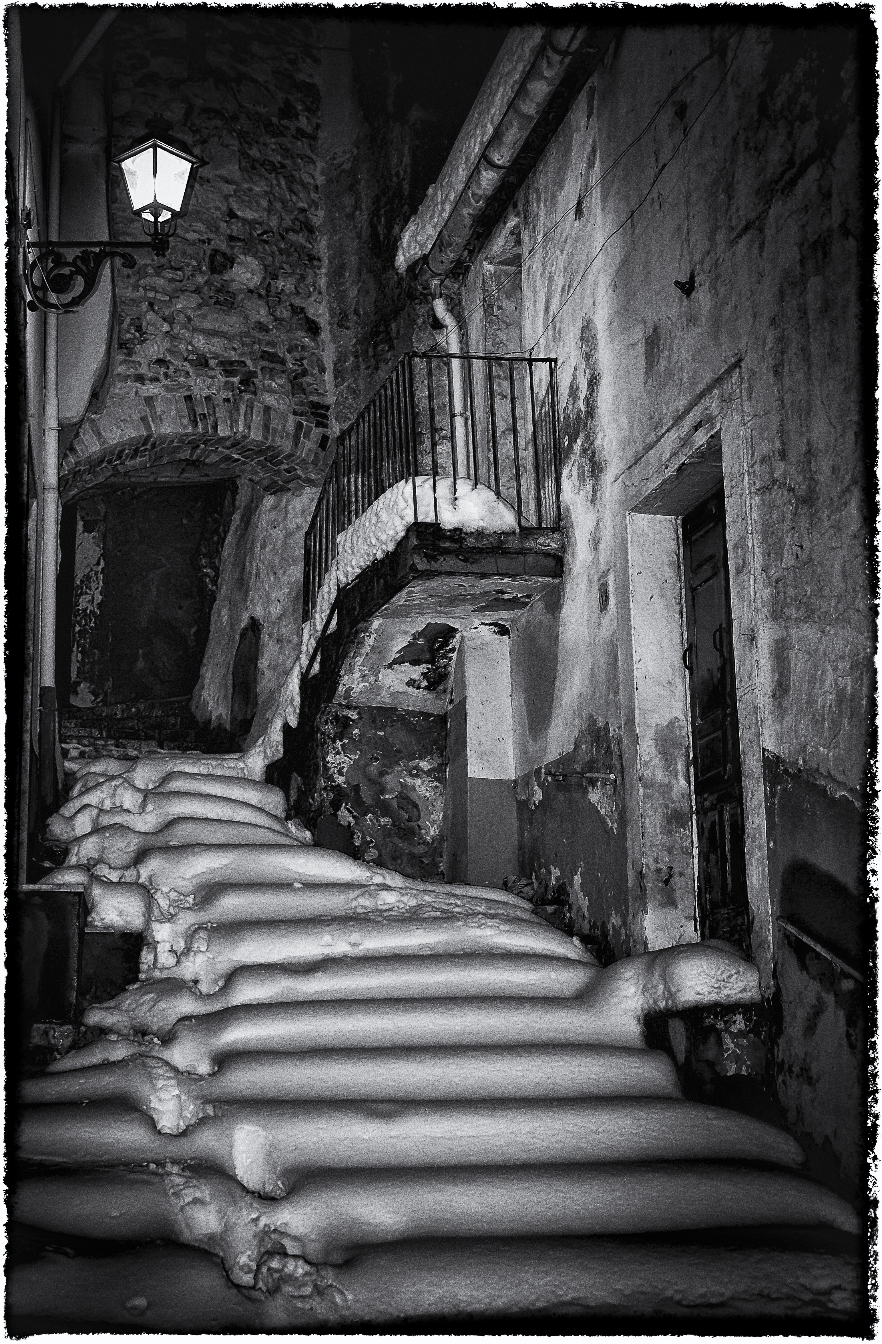 Supportico